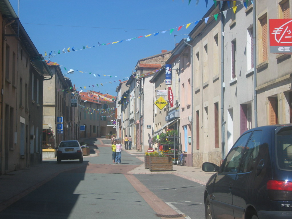 Rue Centrale